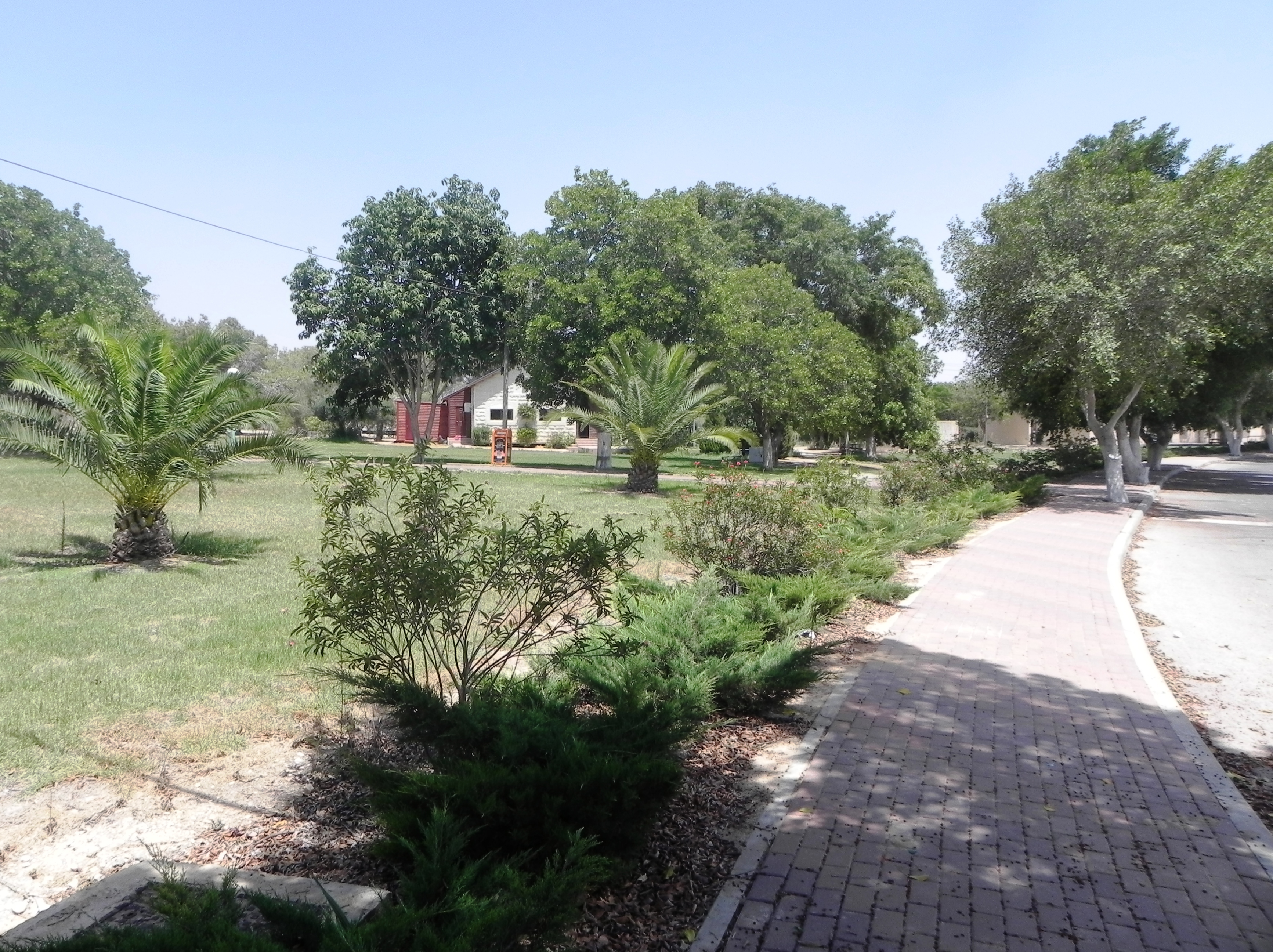 מושב זרועה.